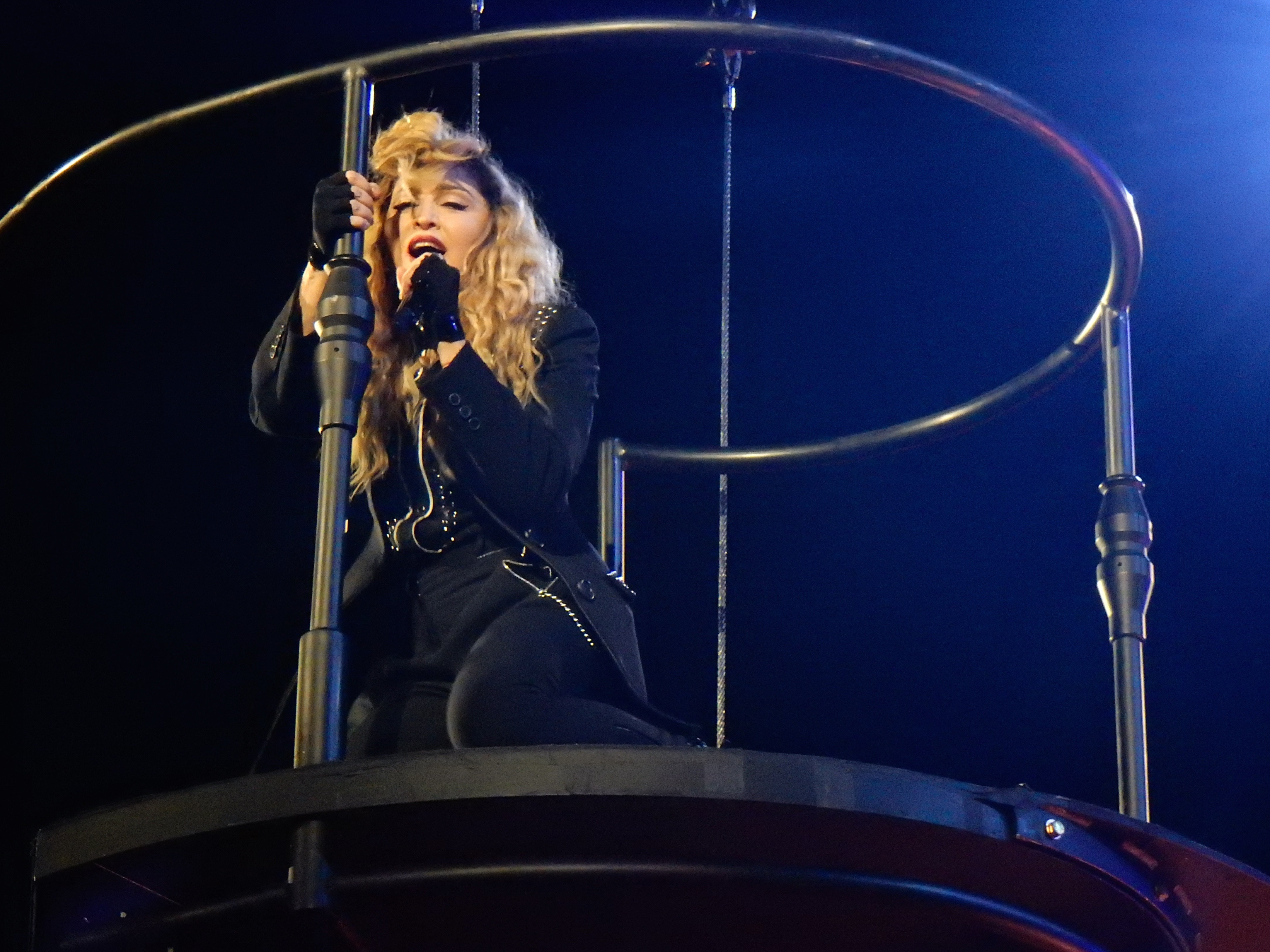 Madonna - Rebel Heart Tour 2015 - Zurich